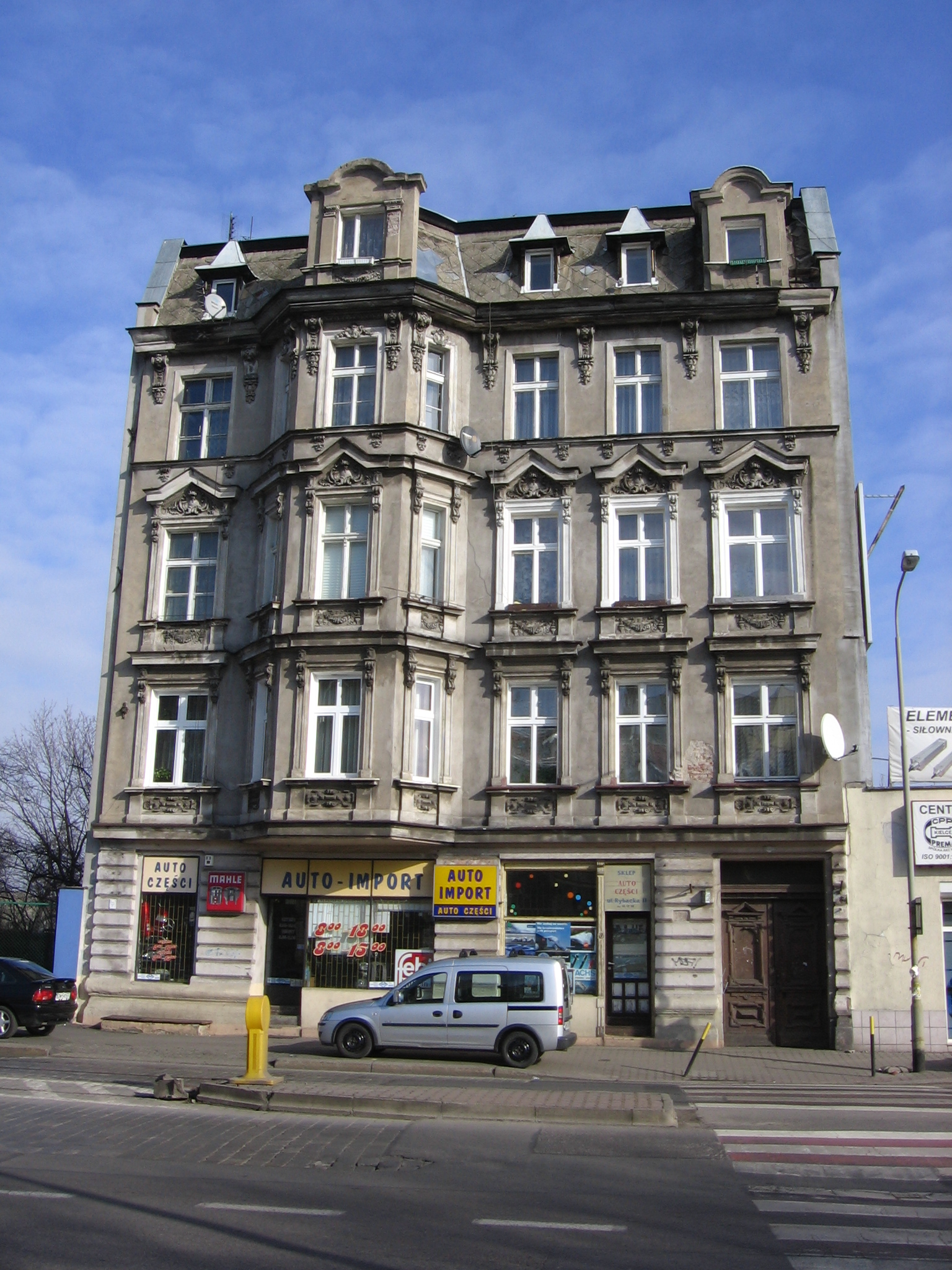 Szczepin, Wrocław - kamienica przy ul. Rybackiej 13